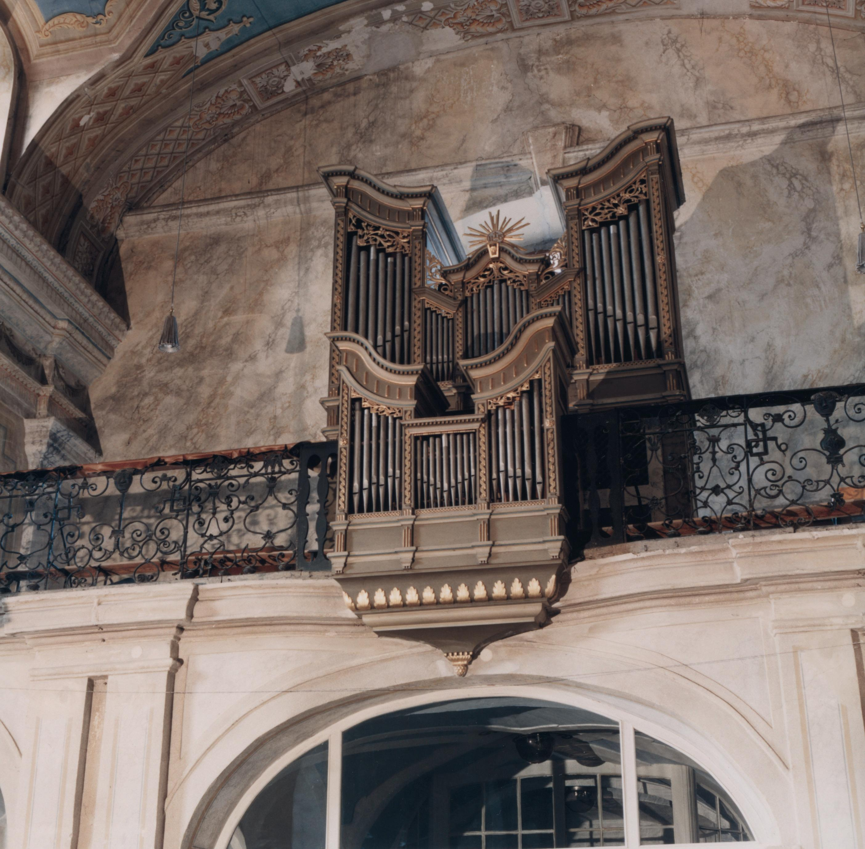 Orgulje u crkvi sv. Jurja u Petrovaradinu